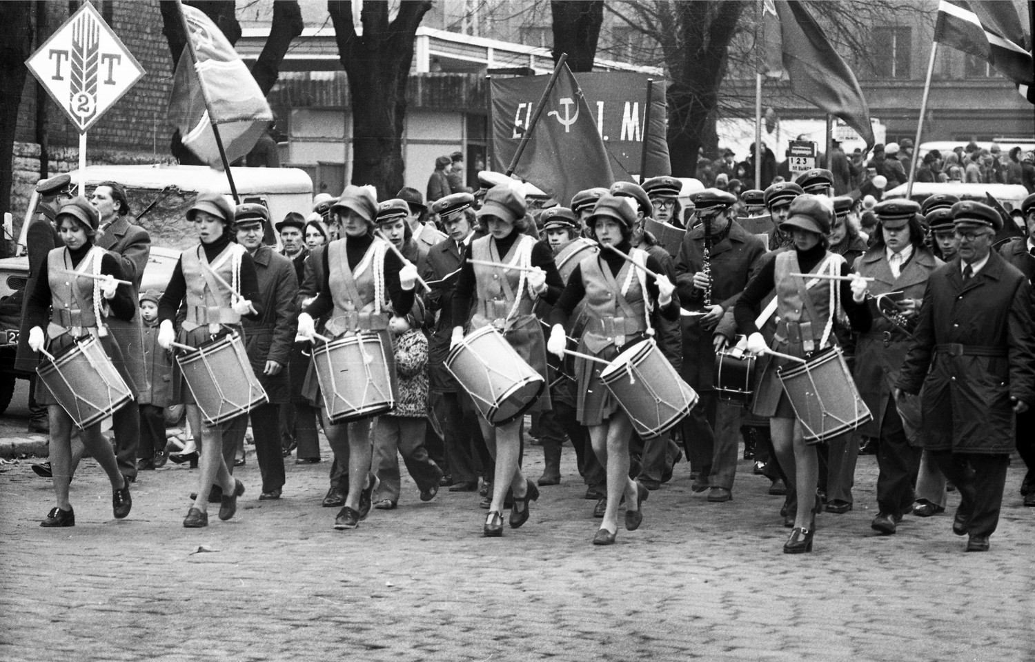 1. mai paraad Tallinnas 73 (01)